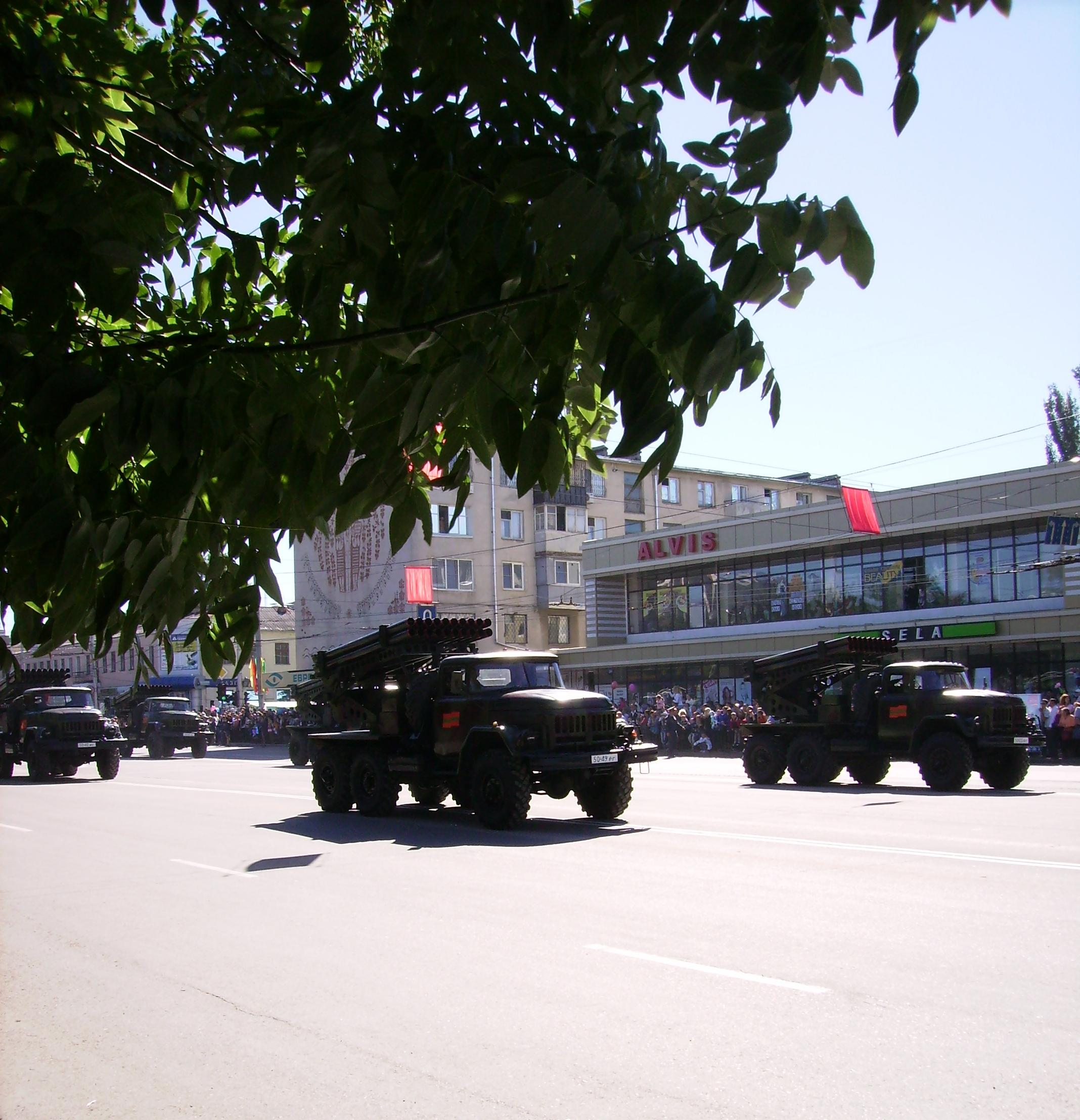 Военный парад на площади им. А.Суворова в честь 20-ти летия независимости ПМР. Так как 20-ть лет круглая дата, то в праде принимала участие военная техника (как и в параде в честь 15-ти летия независимости ПМР).